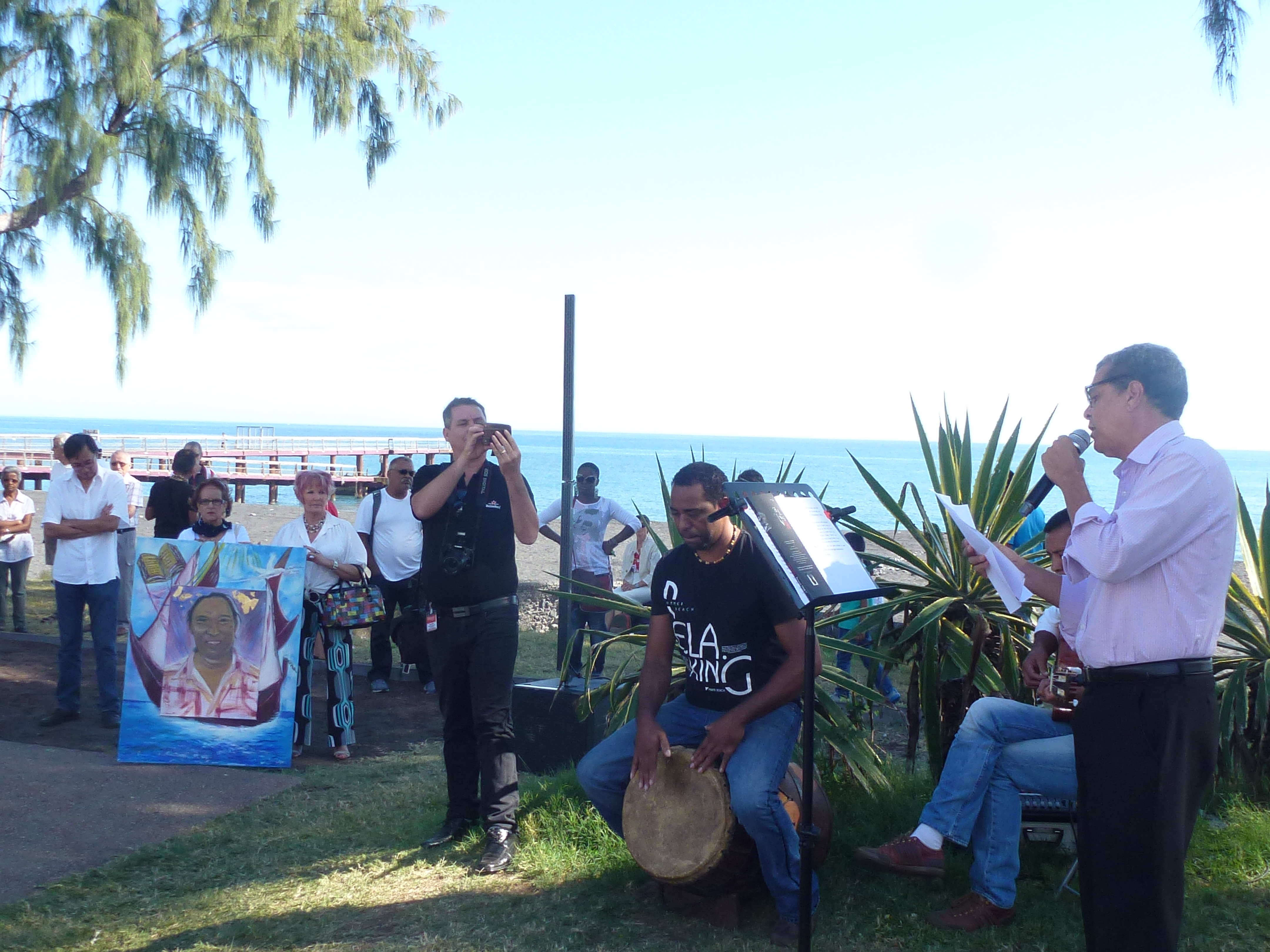 Hommage à Sudel Fuma à St-Paul (Ile de la Réunion) le 12 juillet 2015, un an après sa mort, à l'occasion de l'Espace culturel Sudel Fuma